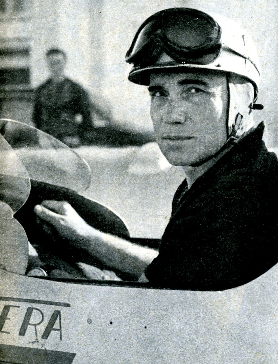 photo from magazine Radiocorriere (1957)